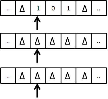 Máquina de Turing multicintas, las flechas indican los cabezales de Lectura/Escritura.